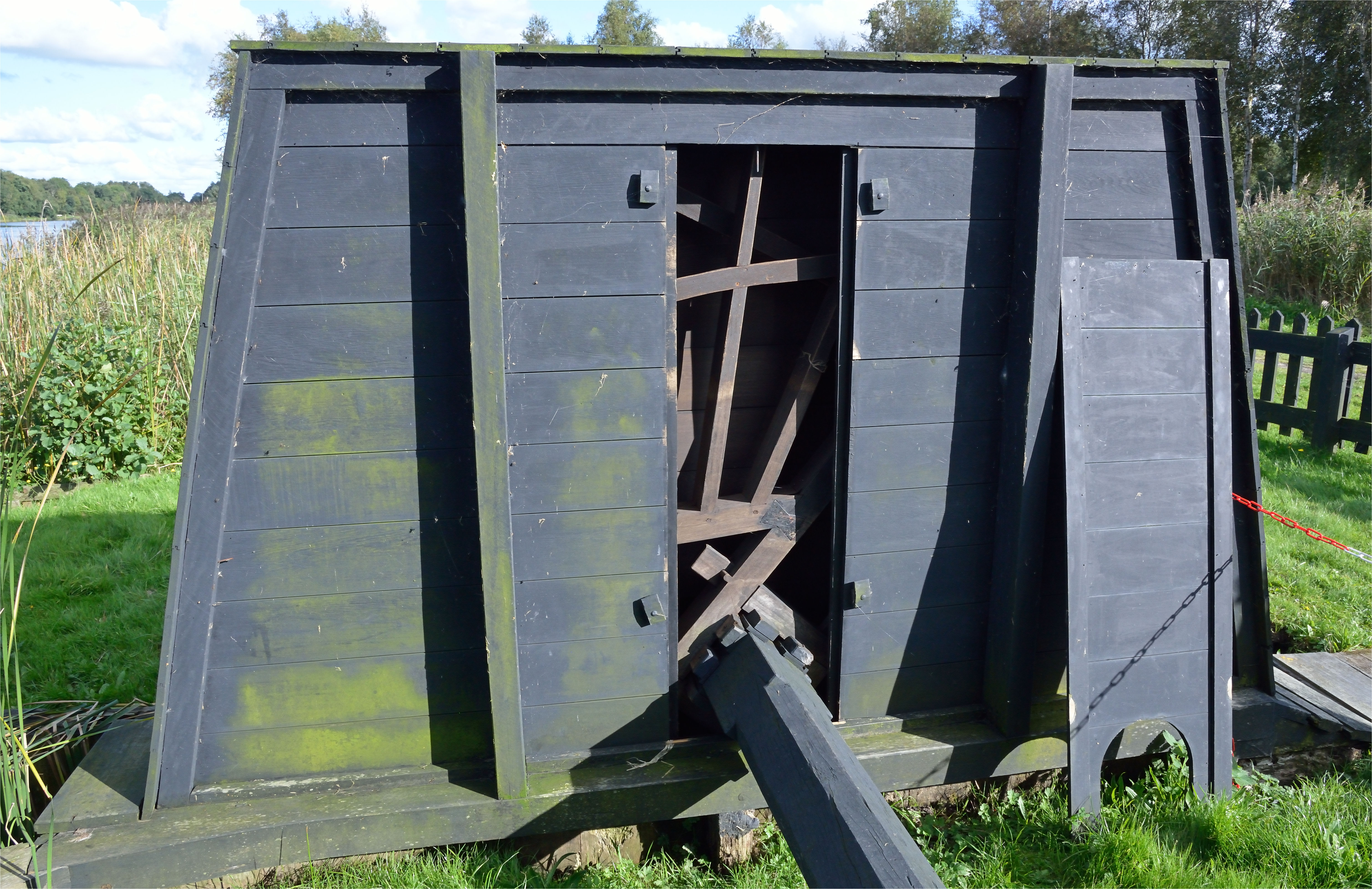 Himriksmole, Tietjerk, scheprad